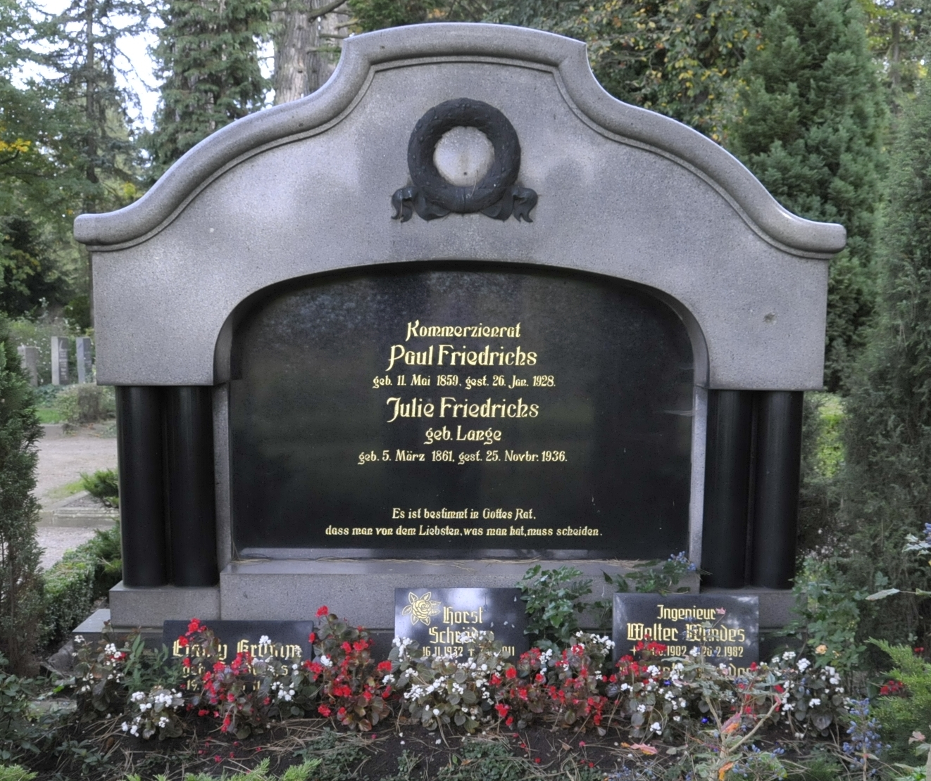 Grabstätte der Familie von Emil Paul Friedrichs